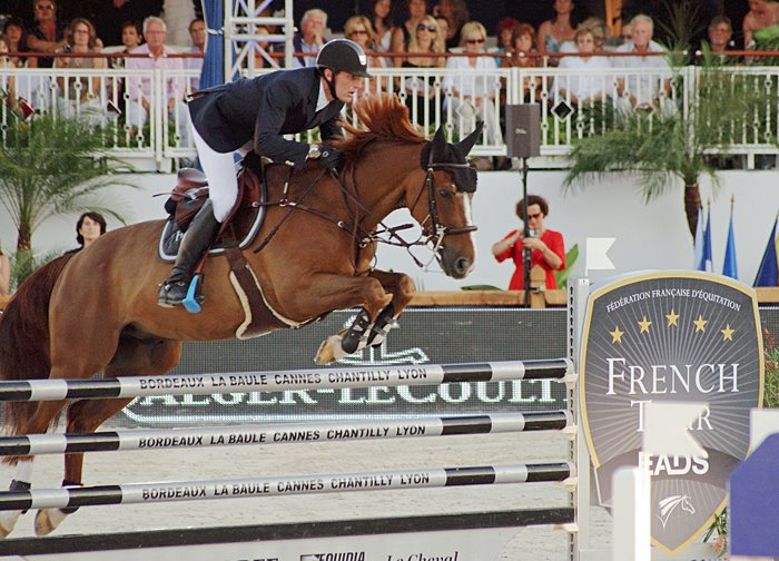 Kevin Staut et Rêveur de Hurtebise*HDC dans le Prix French Tour EADS, lors du Global Champions Tour de Cannes.